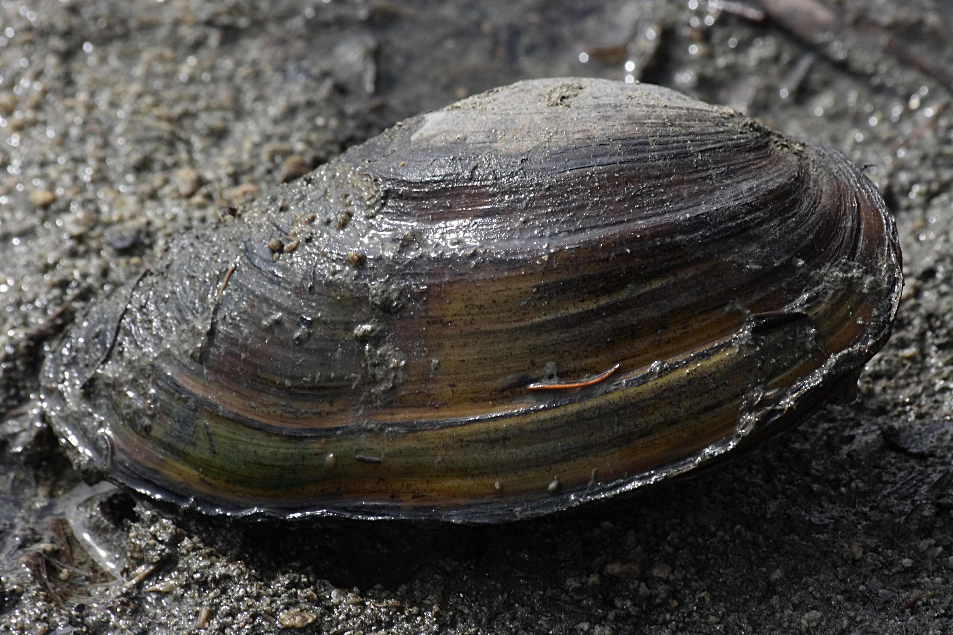 Škeble rybničná (Anodonta cygnea) která žije v bahně na dně rybníků.